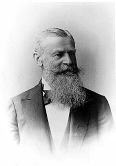 Julius von Auer (1832-1915) Regierungspräsident der Pfalz und von Oberbayern